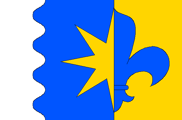 Česky: Babice (okres Olomouc) - vlajka Contents 1 Licensing 2 Zdroj 3 Licensing 4 Original upload log Licensing Zdroj v registru komunálních symbolů (zde)